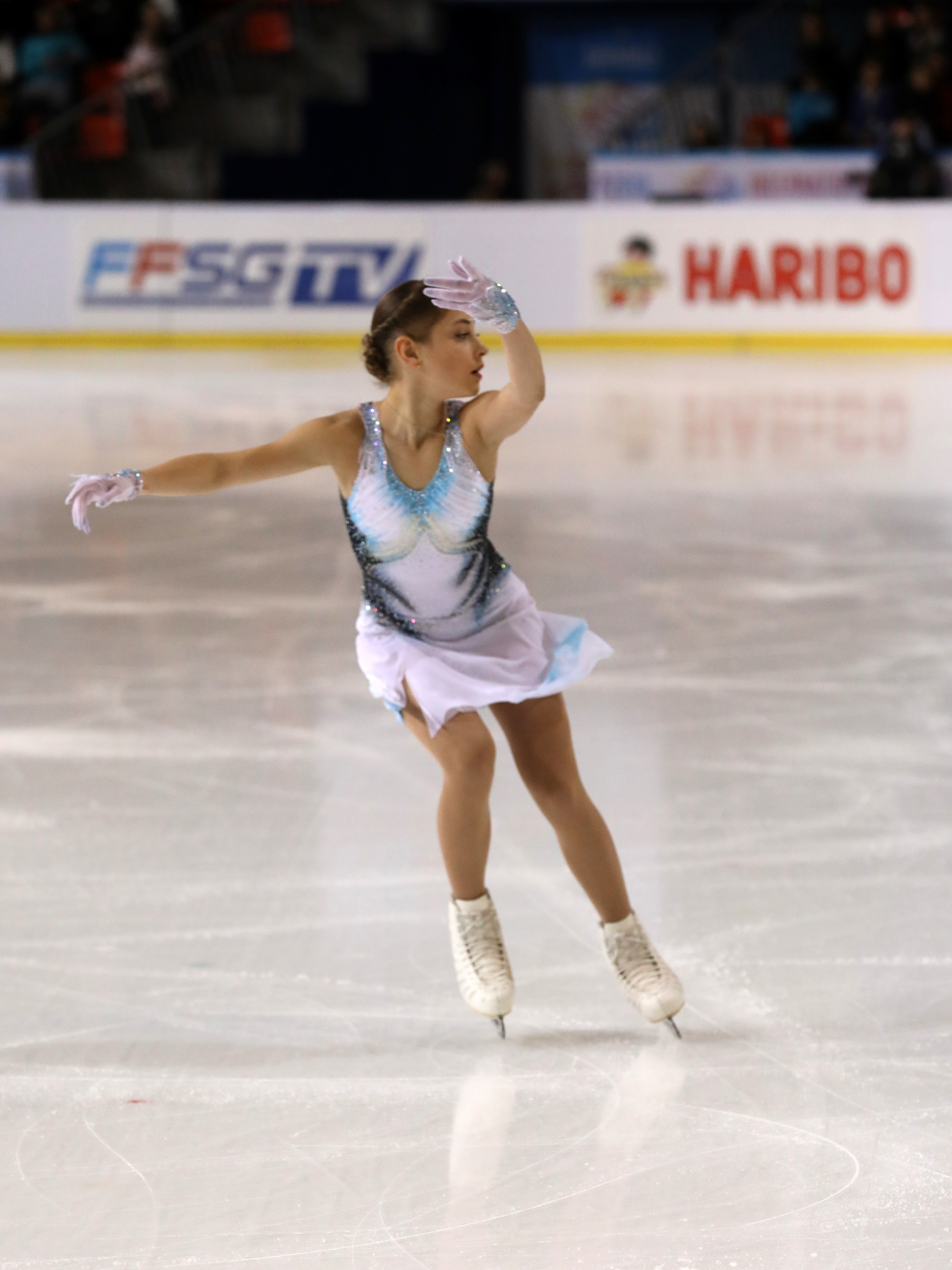 Alena Kostornaia pendant le programme court des Internationaux de France 2019.